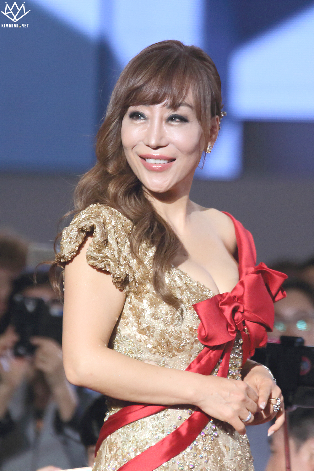 151001 부산국제영화제 개막식 레드카펫